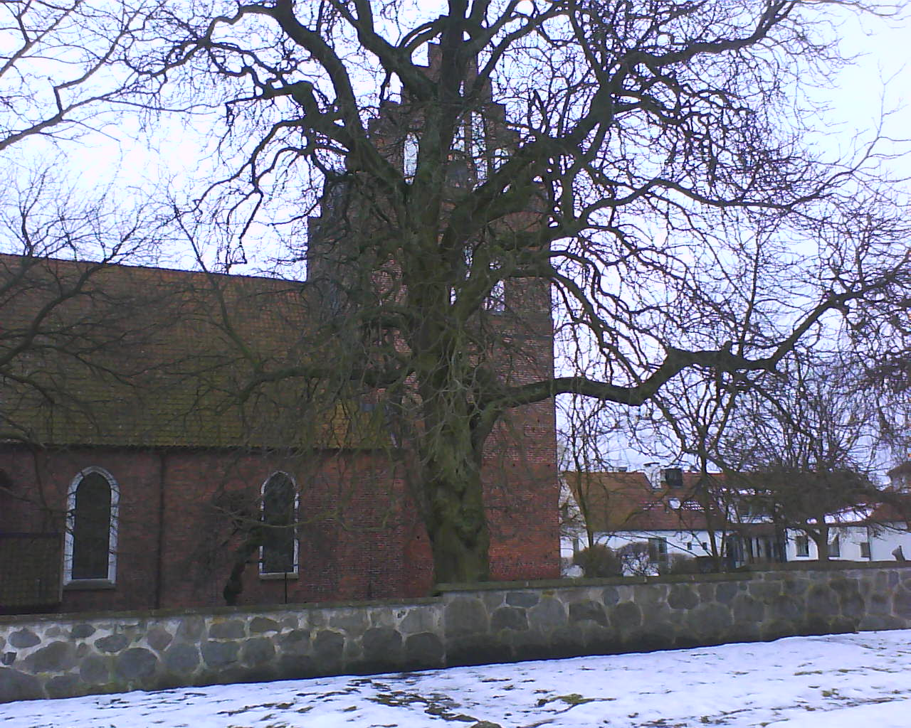 St Nikolai kyrka i Sölvesborg, Blekinge.